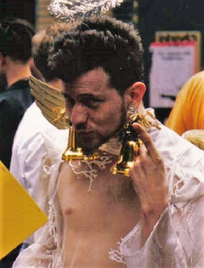 BeV StroganoV beim Christopher Street Day in Berlin, 1990